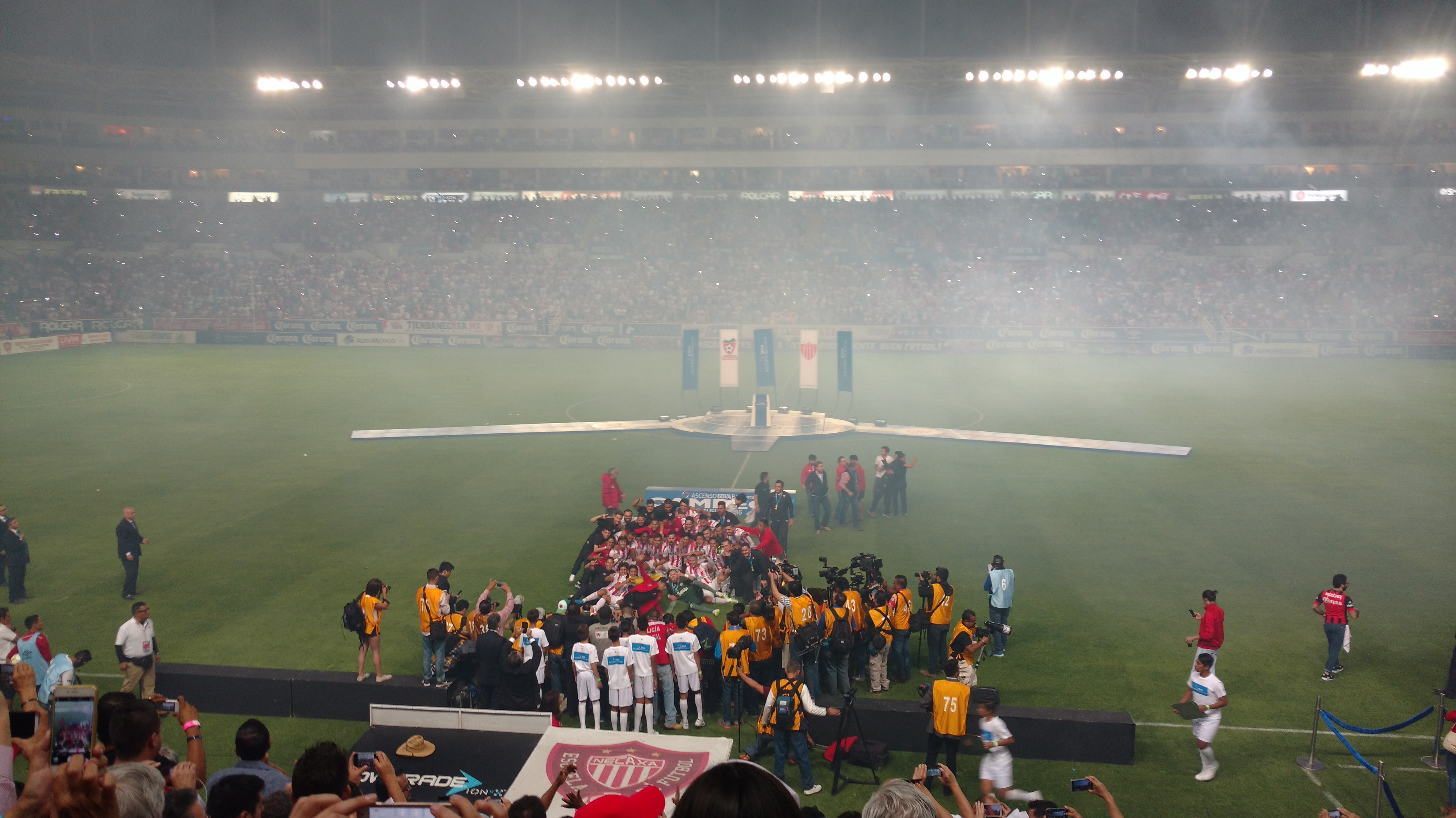 Entrega del trofeo de campeón del torneo Clausura 2016 del Ascenso MX.